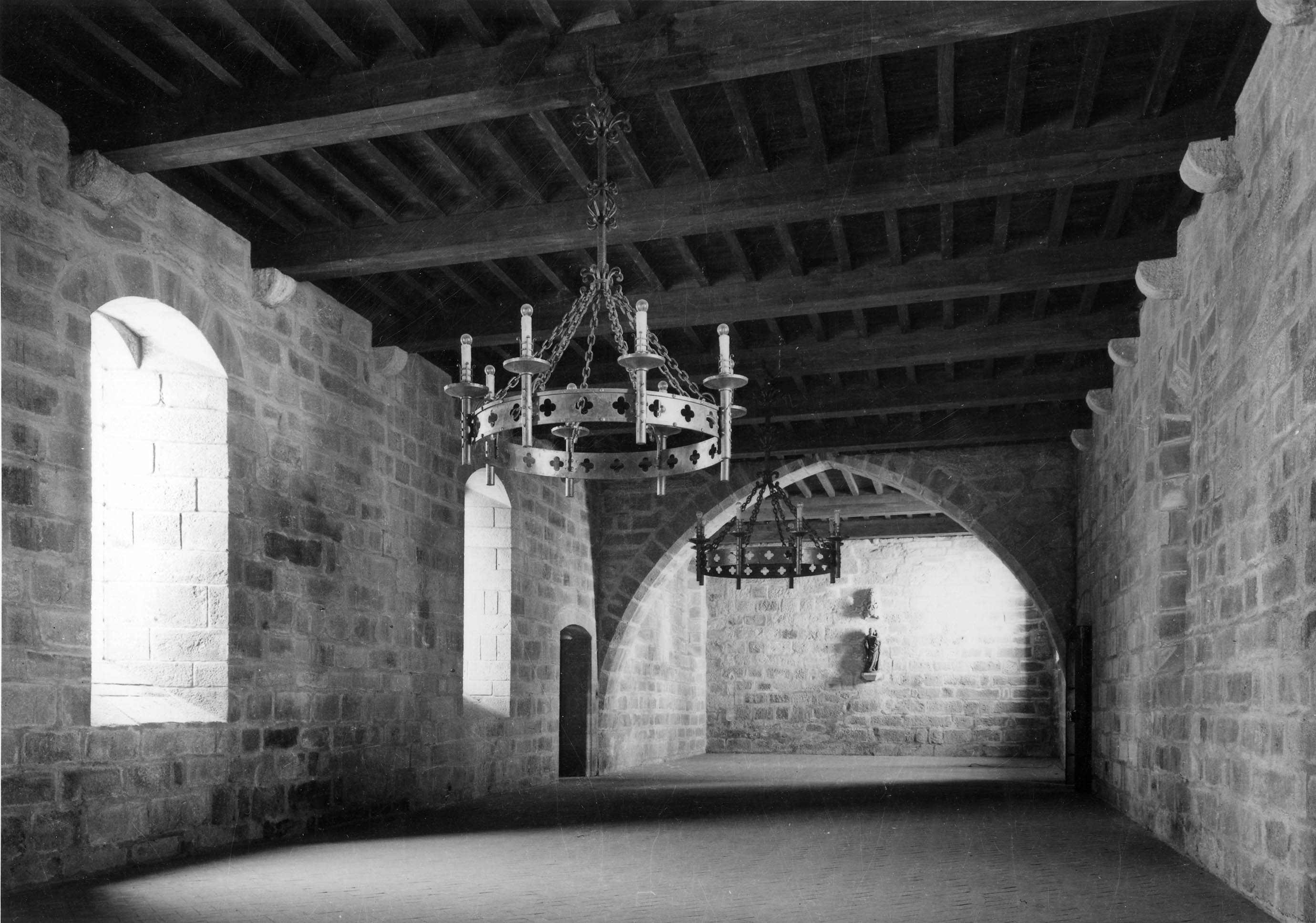 Vista interior. Fotógrafo: Mário Novais, 1899-1967. Orientador científico: Mário Tavares Chicó, 1905-1956. Data aproximada da produção da fotografia original: 1954. [CFT015.008.ic]